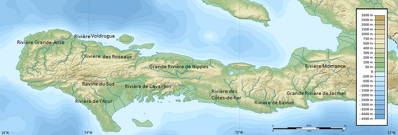 Carte géographique représentant les principaux fleuves qui coulent dans la péninsule de Tiburon à Haïti.